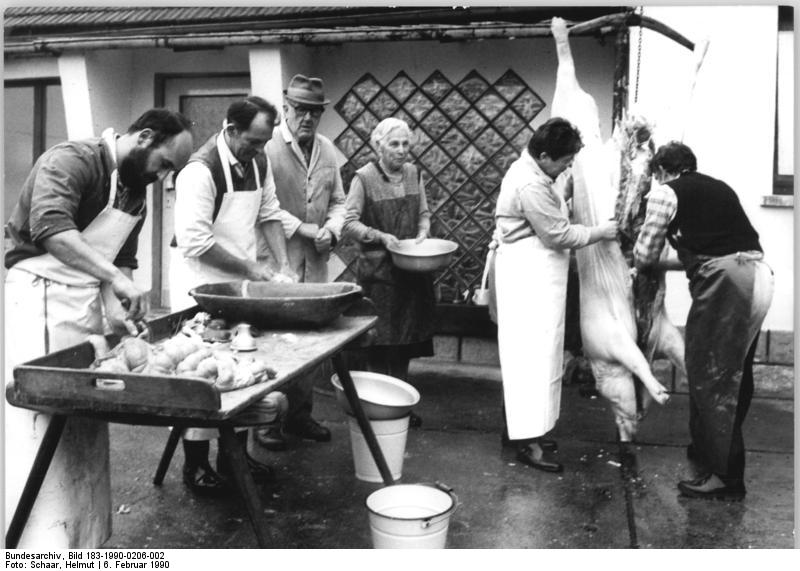 Reichenhausen, Schlachttag ADN-ZB Schaar 6.2.1990-pak-Suhl: Schlachttag-Ohne "Halali", ohne schmetterndes Hornsignal, sondern ganz sachlich-nüchtern geht es zu, wen beim Schlachttag in der kleinen Rhöngemeinde Reichenhausen ein Schwein zur Strecke gebracht wird, denn in diesem Winter einen kühlen Tag zu treffen, ist nicht leicht. Abgesehen von der traditionellen Wurstsuppe, von der noch am selben Abend Verwandte und freunde kosten, "steigt" das eigentliche Fest dann am nächsten Tag.